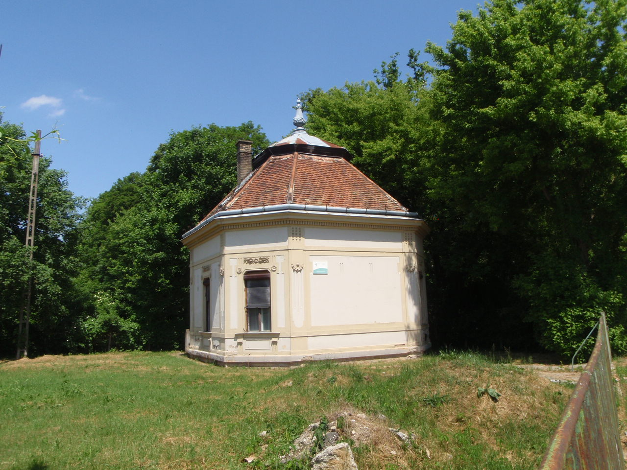 Hatvany-Deutsch-kastély melléképülete